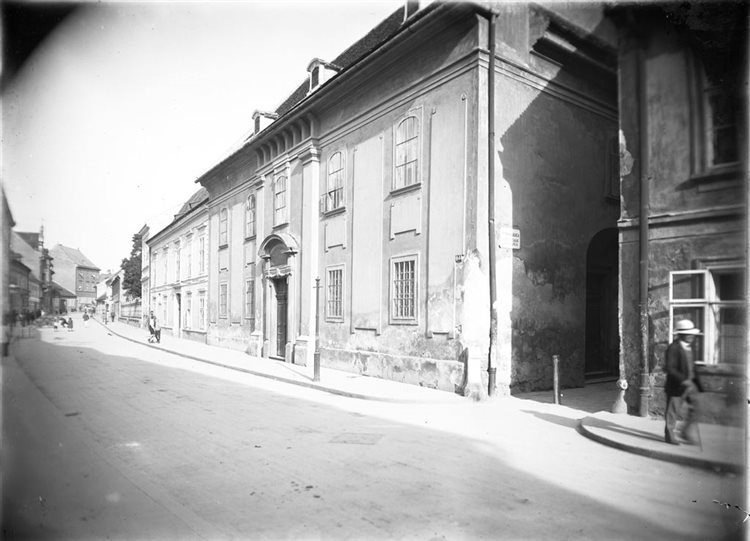 Die Kirche wurde im Jahre 1777 auf der Nonnenbahn für die ehemalige "slawisch-ungarische" Kirchengemeinde erbaut. Heute wird sie als 'Kleine Kirche' bezeichnet.